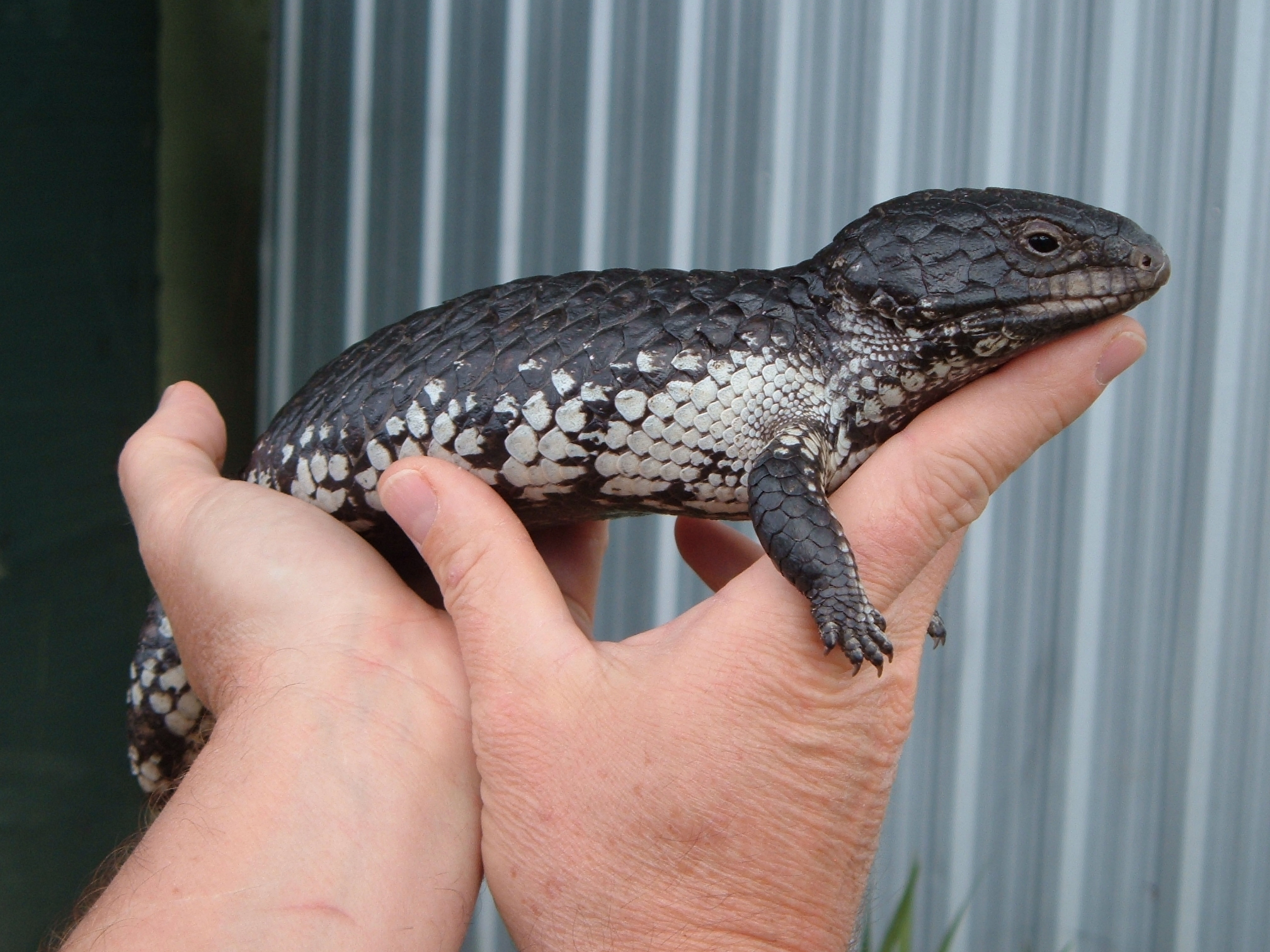 Shingleback (Tiliqua rugosa)